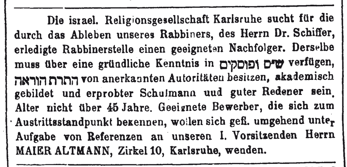 Advert